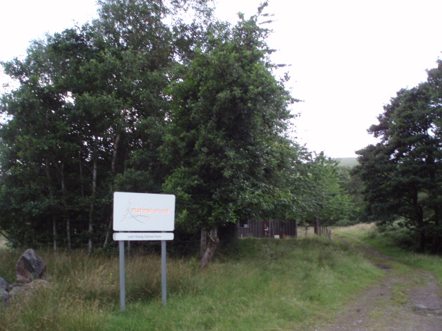 Fish farm beside Loch Arkaig